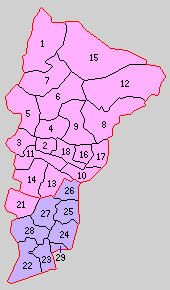 後の熊本県鹿本郡域の町村制時点の町村。